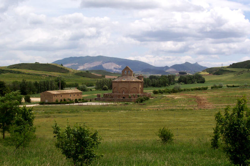 church/iglesia santa maria de eunate